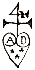 Un quatre de chiffre surmontant un coeur